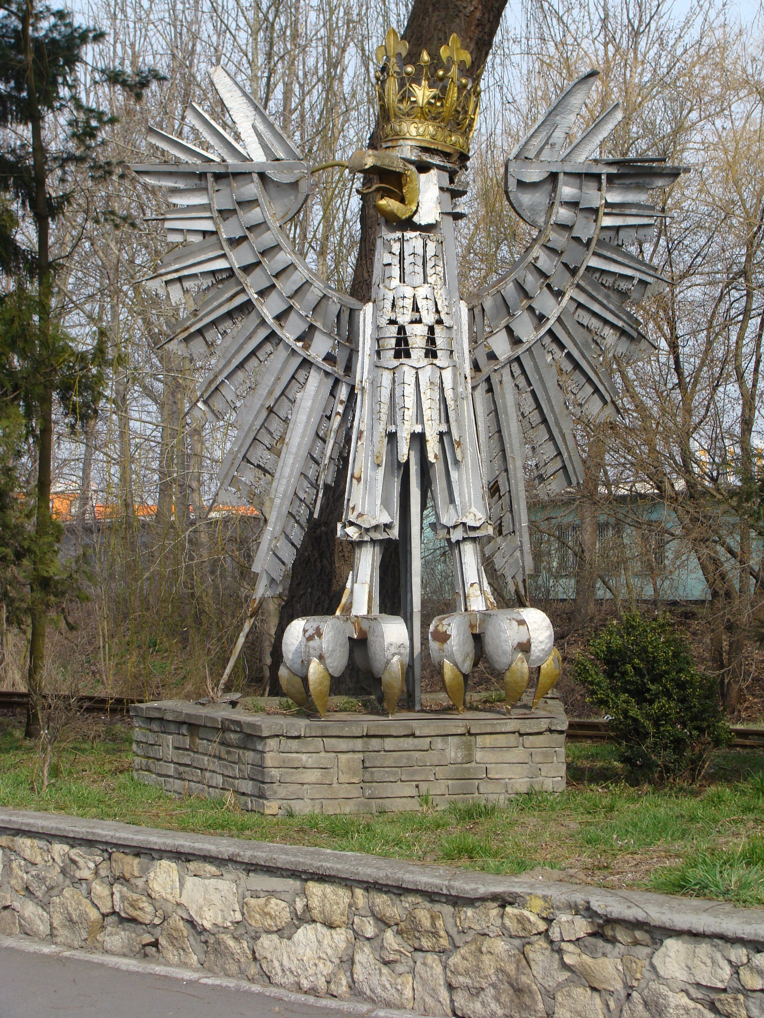 Orzeł - rzeźba Mariana Nowaka, ul. Budowlanych w Opolu